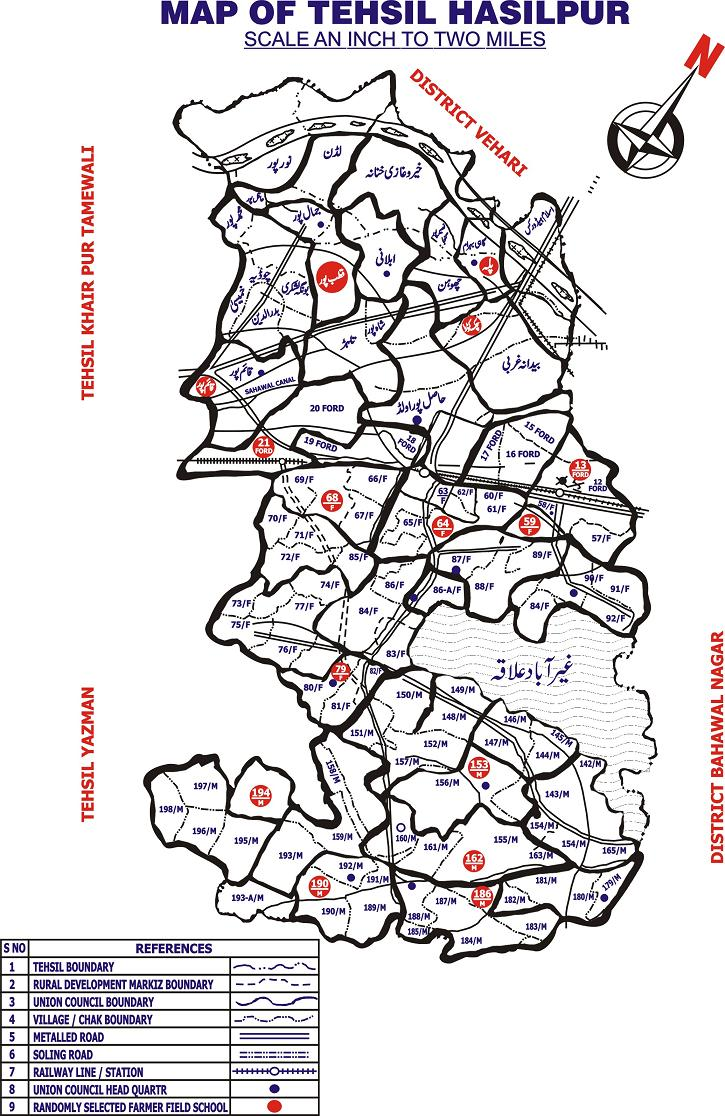 پنجابی: تحصیل حاصل پور دے پنڈاں دا نقشہ